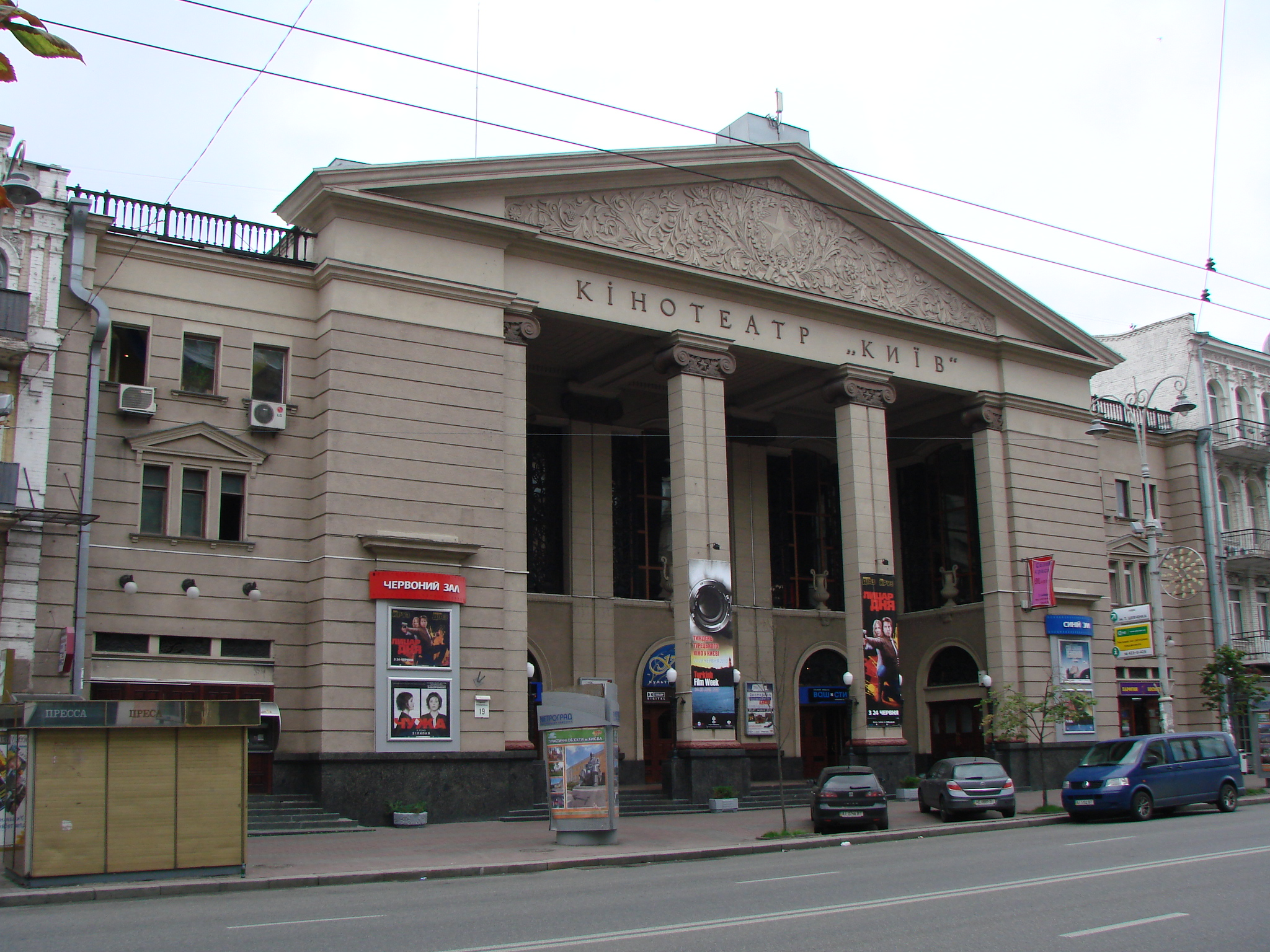 Кінотеатр "Київ"